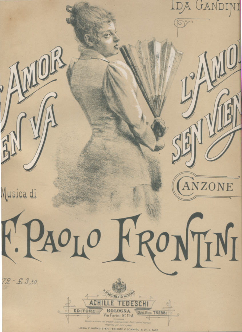 Riproduzione copertina,L'amor sen va - L'amor sen viene, canzone, ed. A. Tedeschi XIX secolo